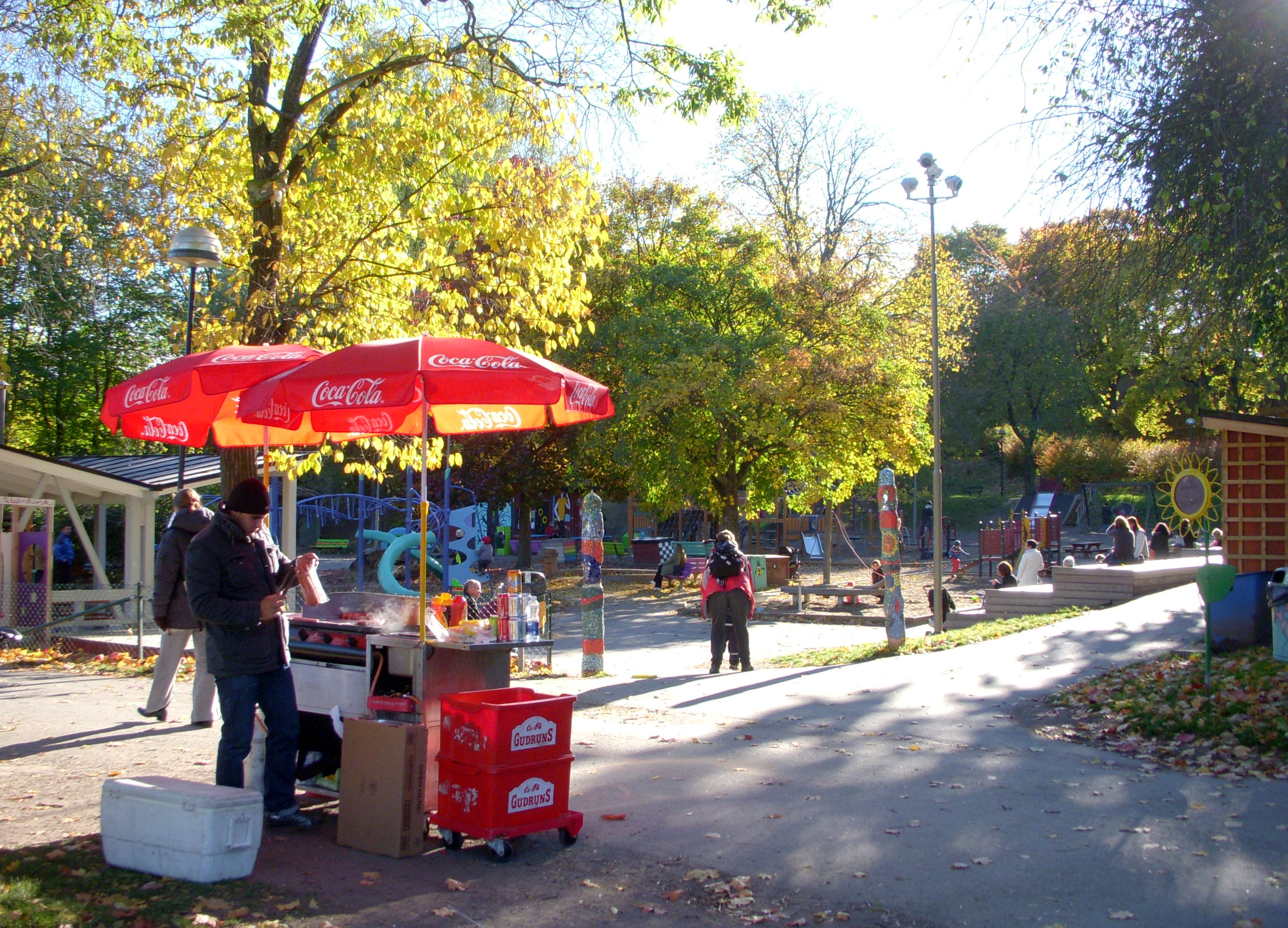 Rålambshovsparken i Stockholm, parkleken